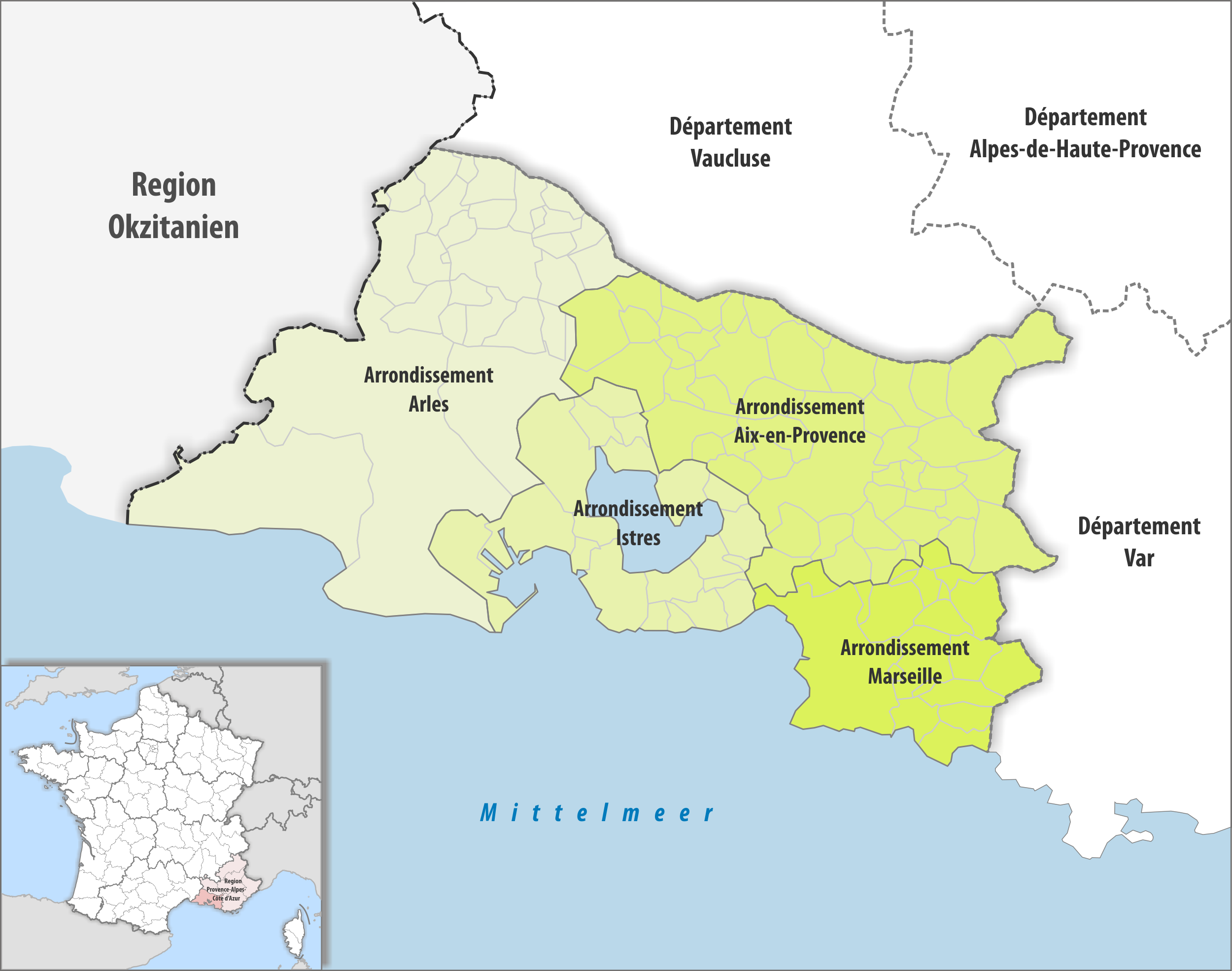 Arrondissements im Departement Bouches-du-Rhône